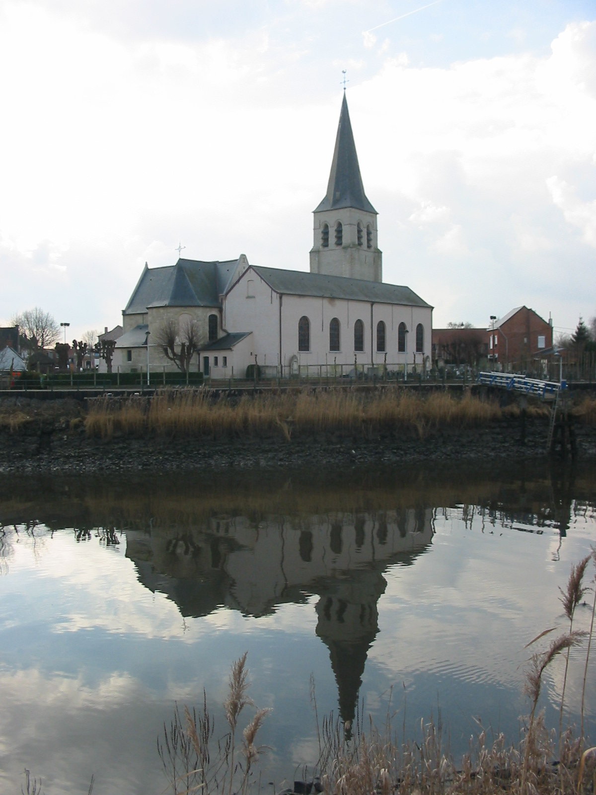 Church of Schellebelle, in Belgium